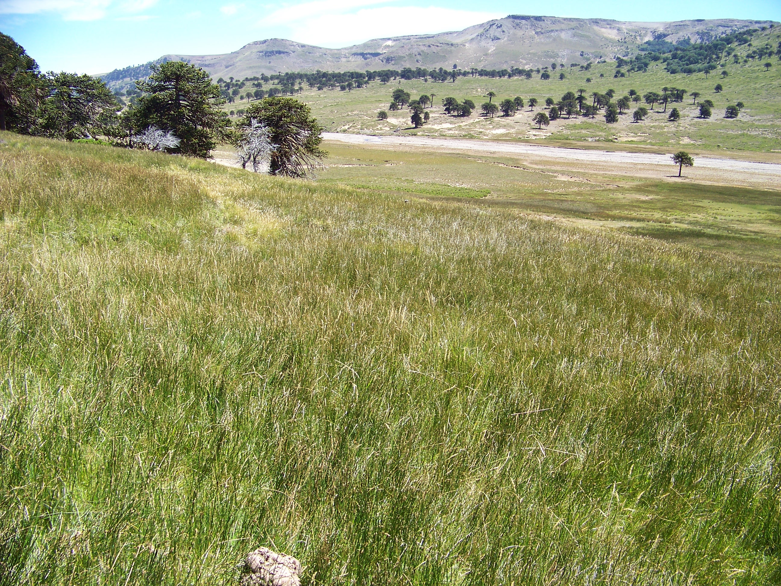 Mallin en el paraje Cochico Grande, provincia del Neuquen, republica Argentina